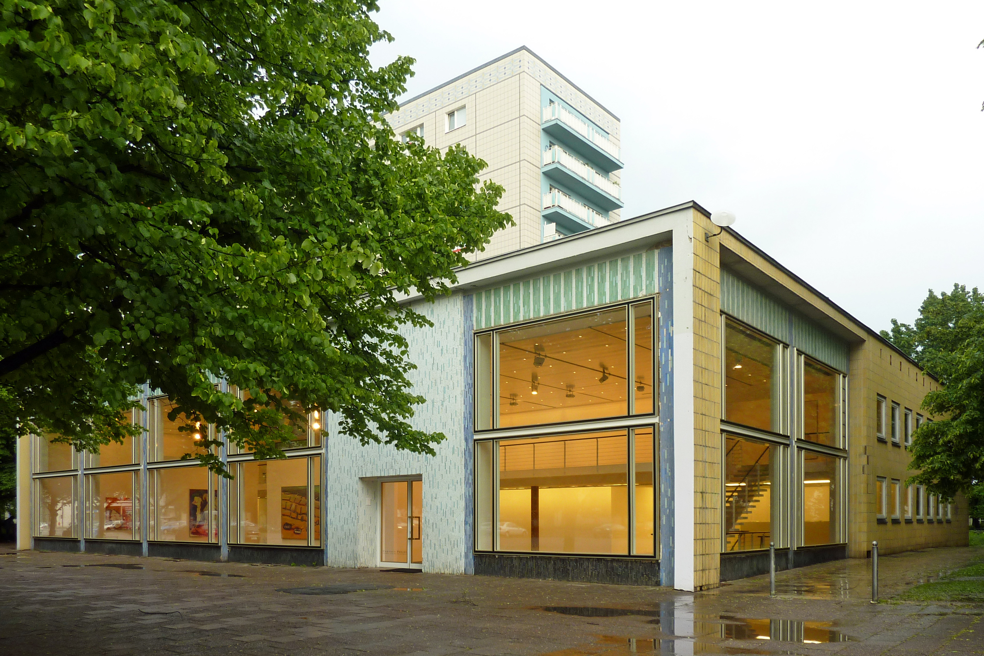 Ausstellungspavillon in der Karl-Marx-Allee 45 in Berlin-Mitte; ehemals 'Kunst im Heim'. Gebaut 1960–1963 nach einem Entwurf von Josef Kaiser und Walter Franek. Steht als Teil der Gesamtanlage unter Denkmalschutz. Beherbergt derzeit die Galerie Capitain Petzel